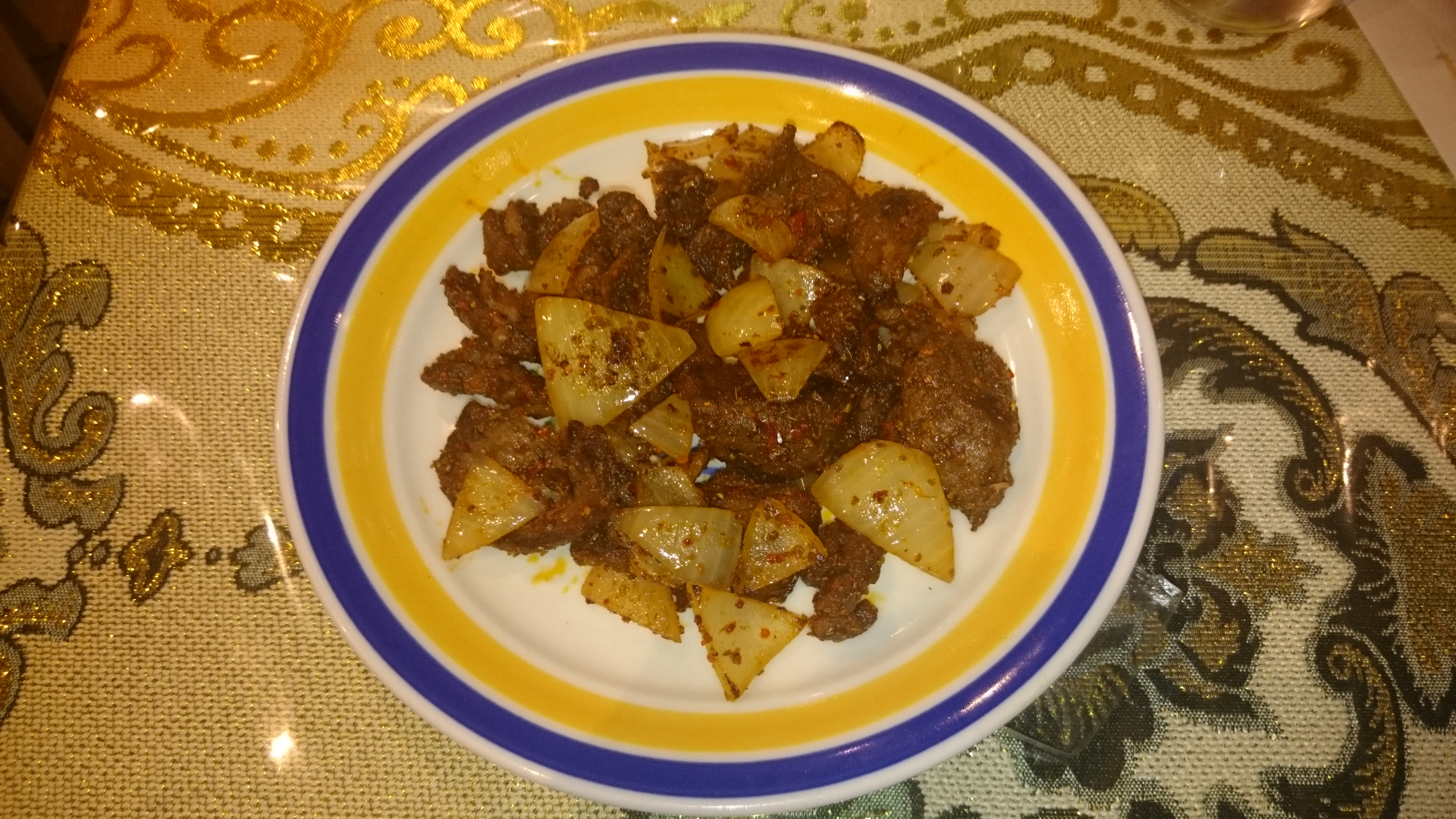 鍋カワプ、羊肉と玉ねぎの炒め物。